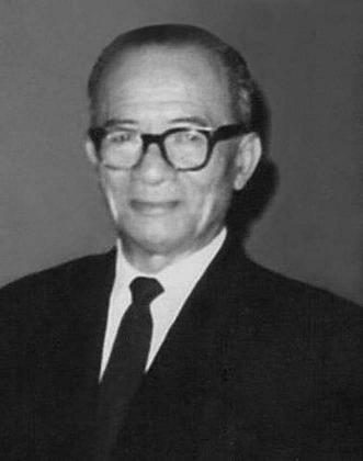 Leonardo Yuta Caceres